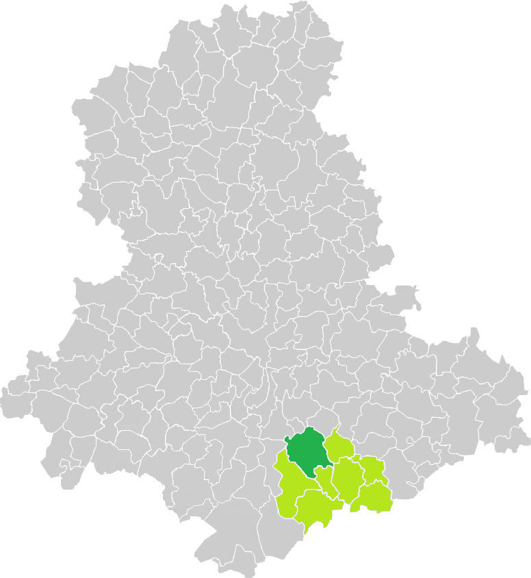 Carte de situation de la commune de Vicq-sur-Breuilh (en vert foncé) dans le votre Canton (en vert clair) sur une carte des communes de la Haute-Vienne